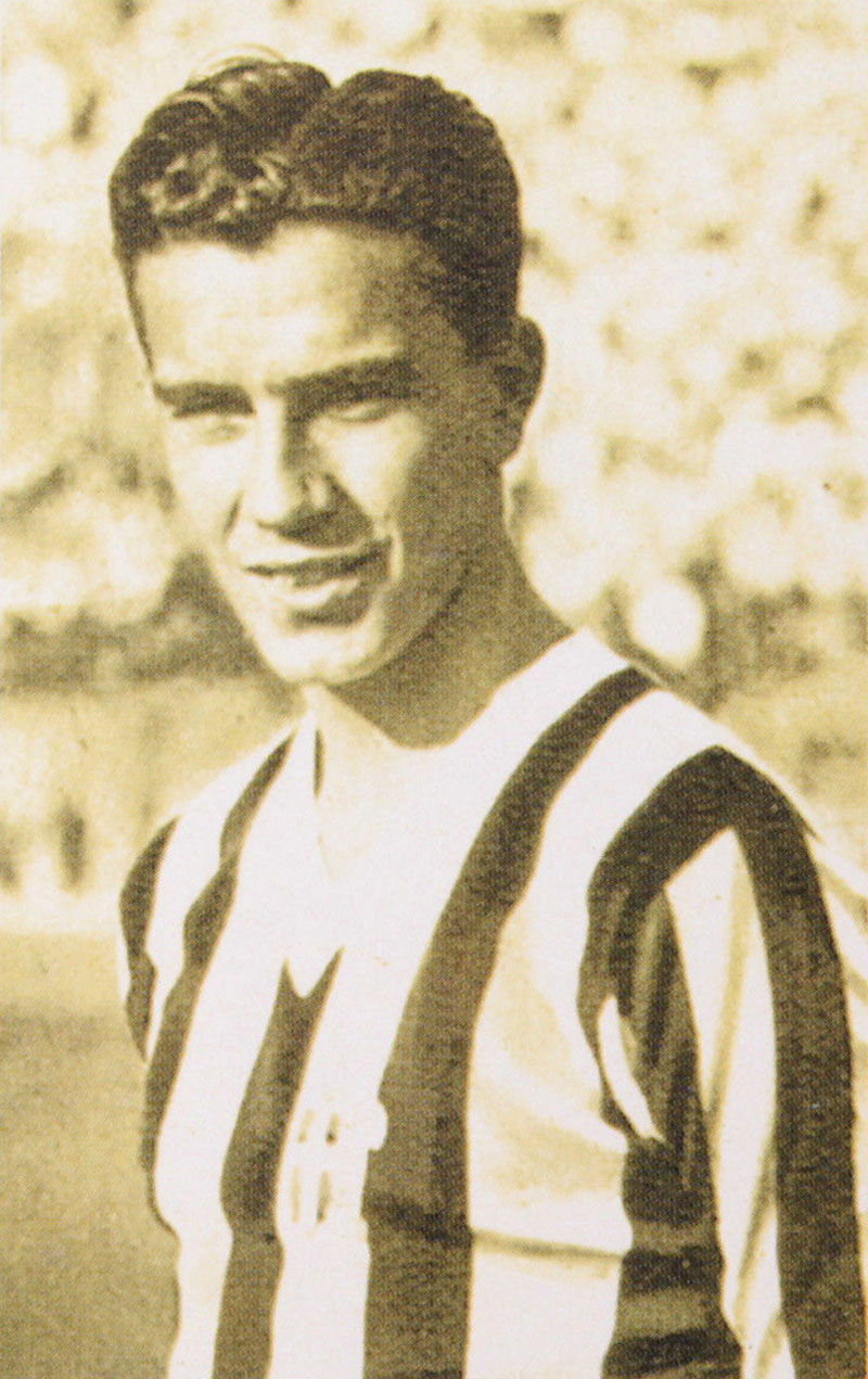 Il calciatore italiano Felice Placido Borel (II) alla Juventus nella prima metà degli anni 30 del XX secolo.